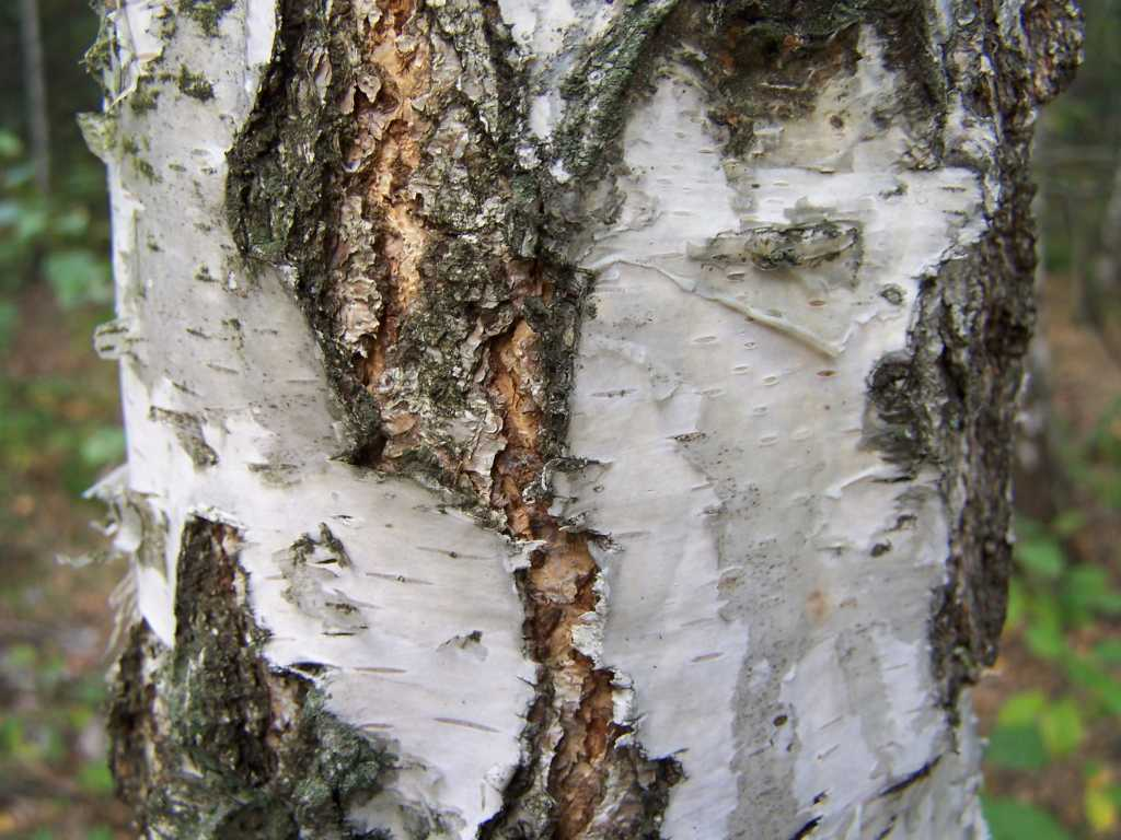 Betula pendula (syn. Betula verrucosa)